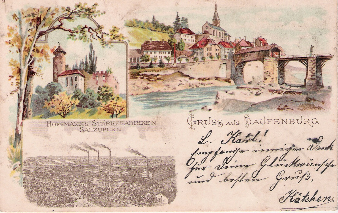 Deutschland, Nordrhein-Westfalen, Kreis Lippe, Bad Salzuflen: Alte Postkarte der Hoffmann’s Stärkefabriken mit Darstellungen aus Laufenburg AG